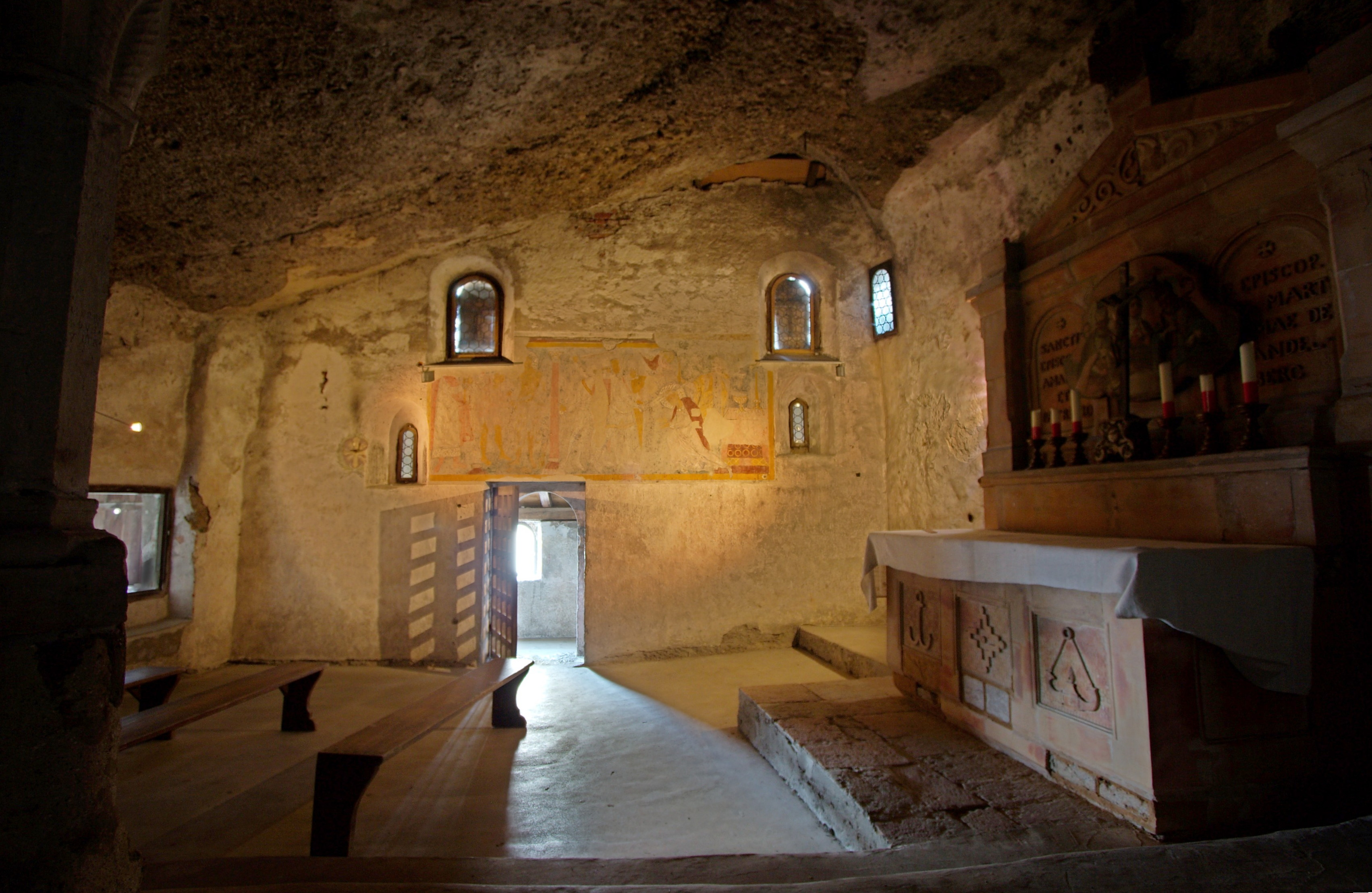 St.Peters Friedhof in Salzburg, Katakomben oberhalb des Friedhofs